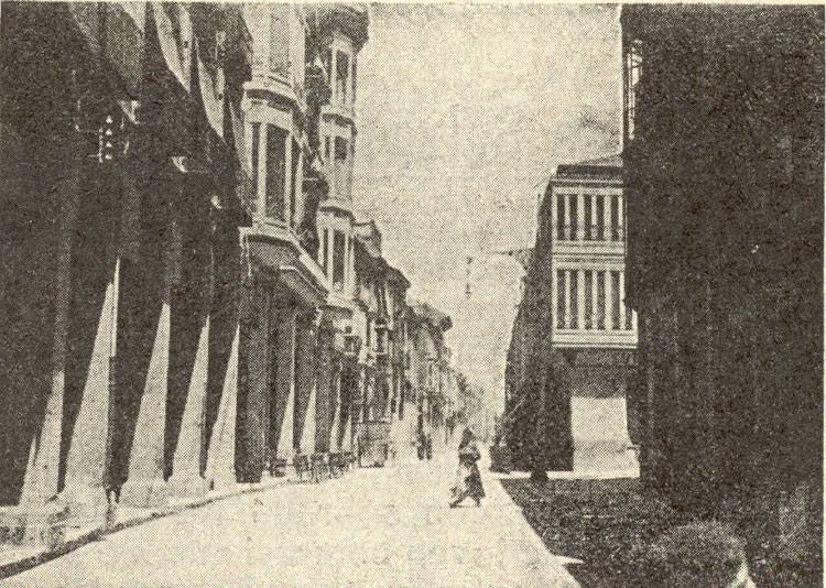 Calle Mayor. 1 Septiembre 1923. p.11.jpg - Palencia - Fotografía B/N